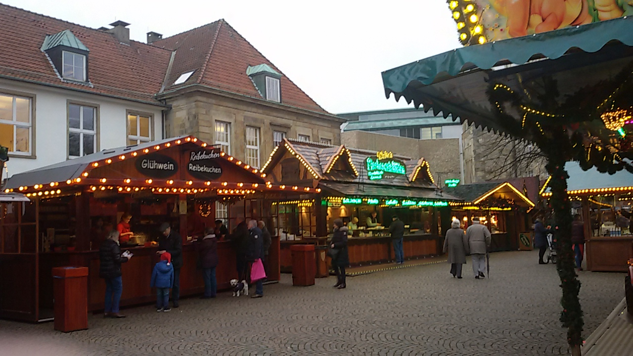 Weihnachtsmarkt Osnabrück 2017